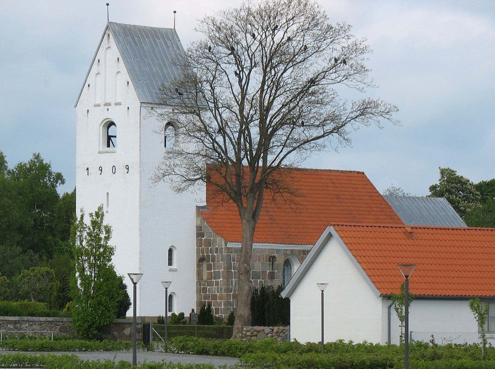 Sønder Felding Kirke.